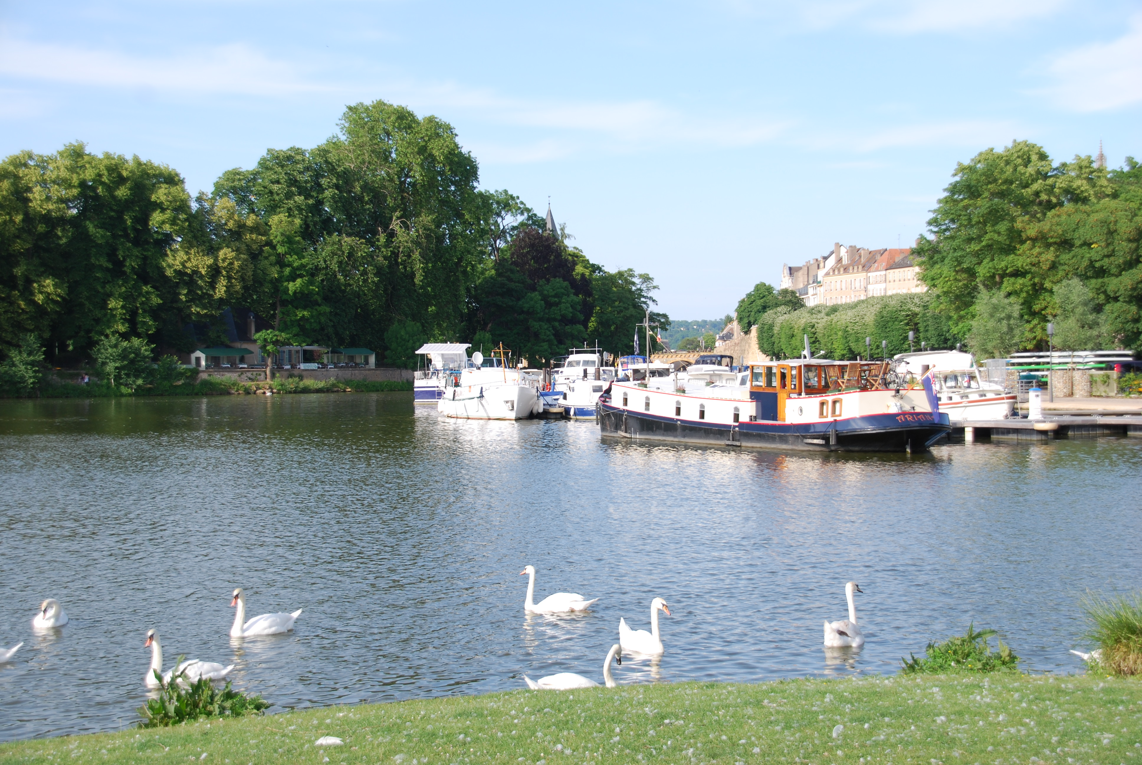 Le Plan d´Eau (Moselarm) in Metz